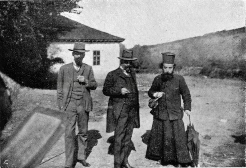 Александър Радев като министър на правосъдието (в средата) в 1903 година